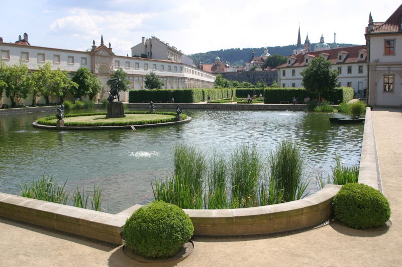 Valdstejnska zahrada.